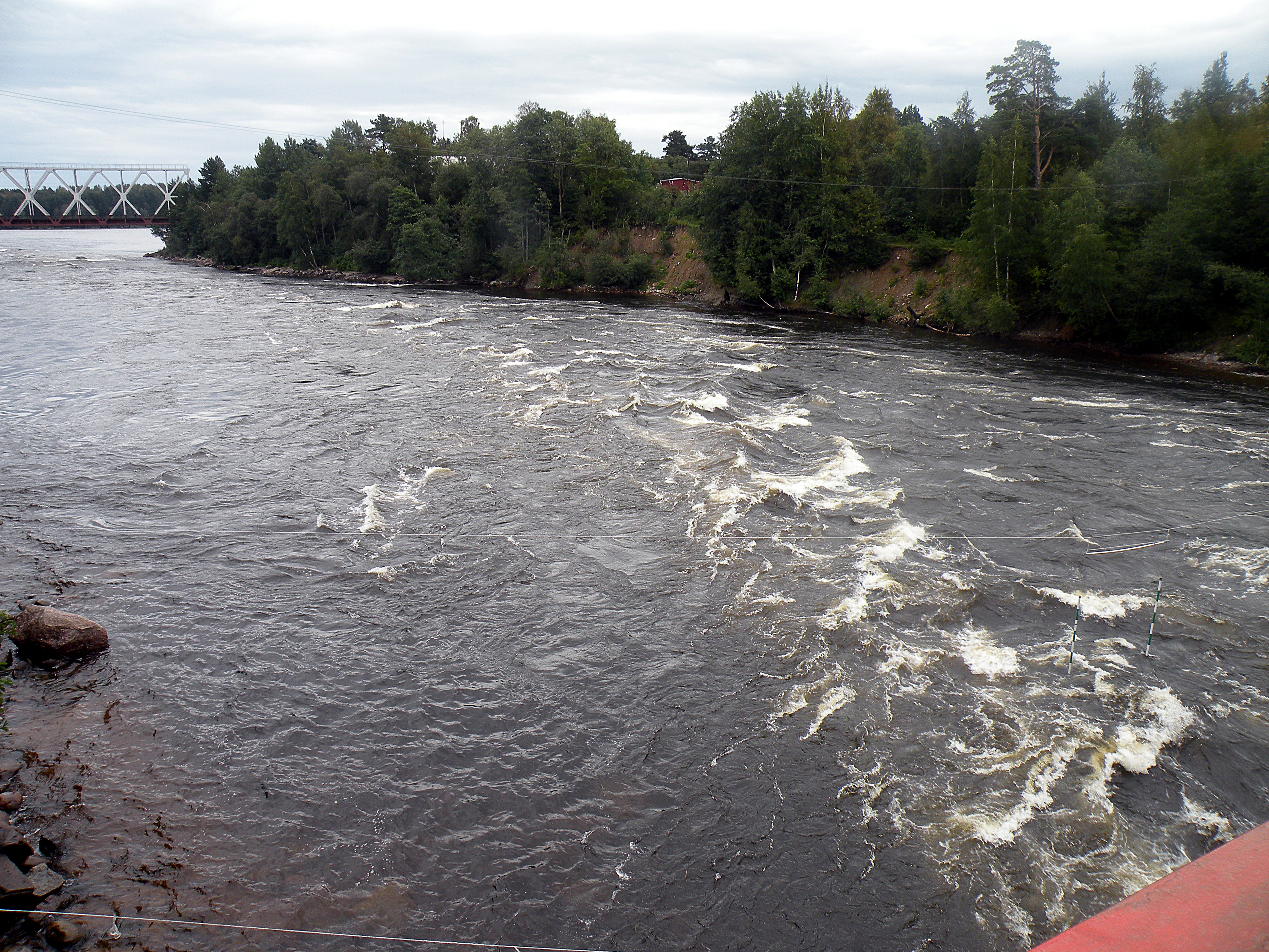 Вуокса.Лосевские пороги (ниже моста).